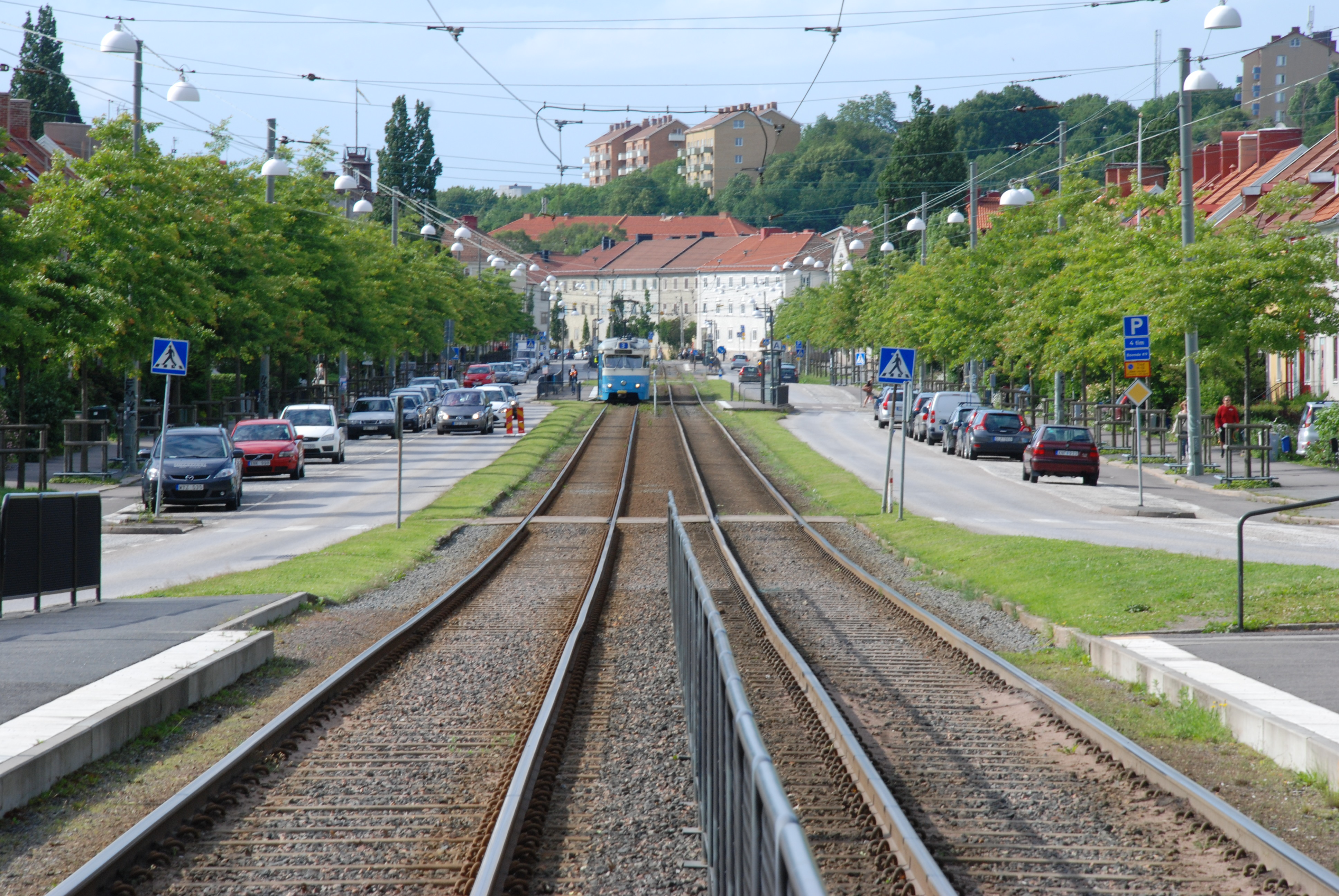 Kungsladugårdsgatan i stadsdelen Kungsladugård i Göteborg. Spårvagnslinje 3 på väg mot Marklandsgatan.